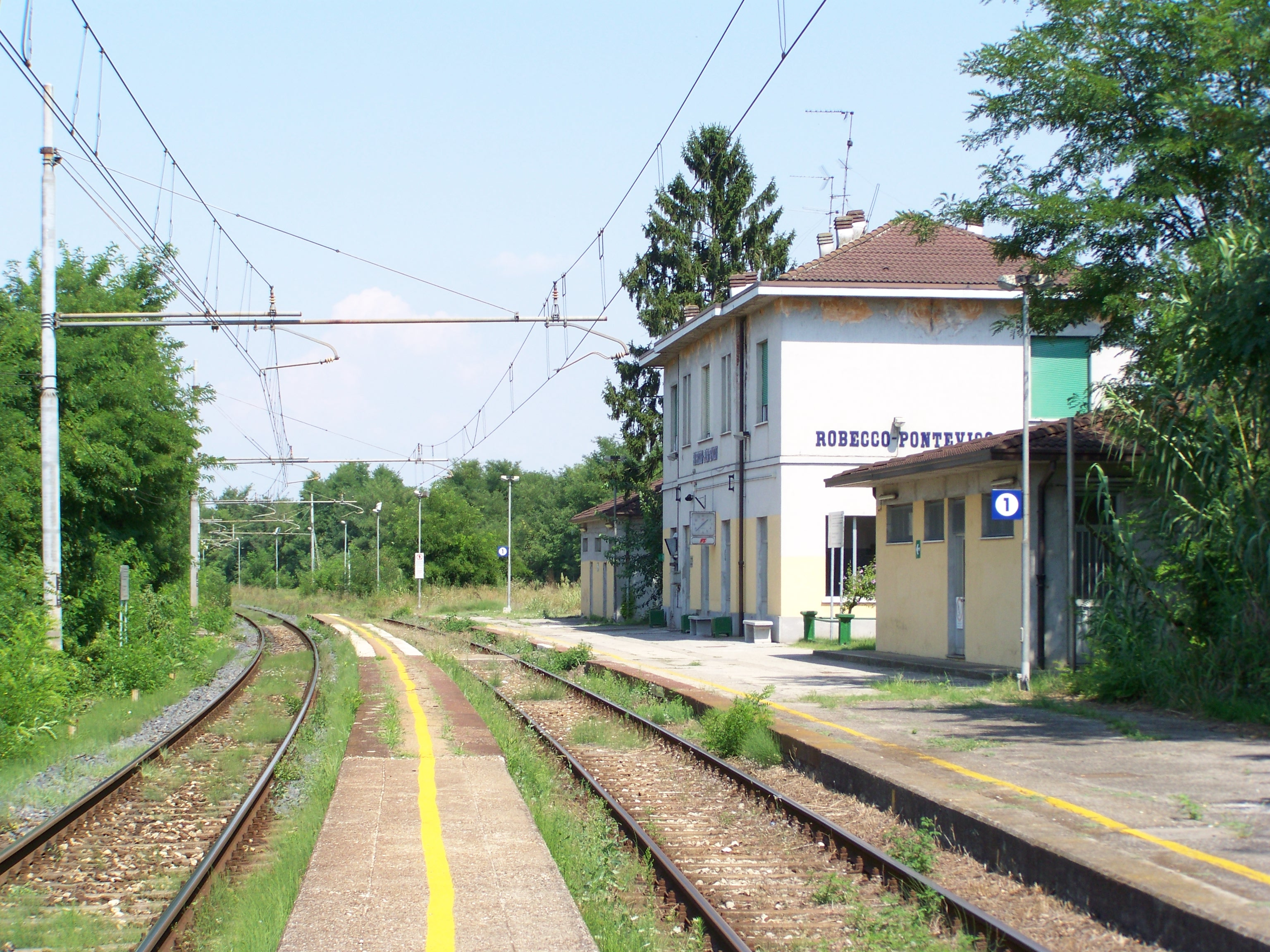 Piazzale binari della Stazione di Robecco-Pontevico sulla Brescia-Cremona a Robecco d'Oglio.